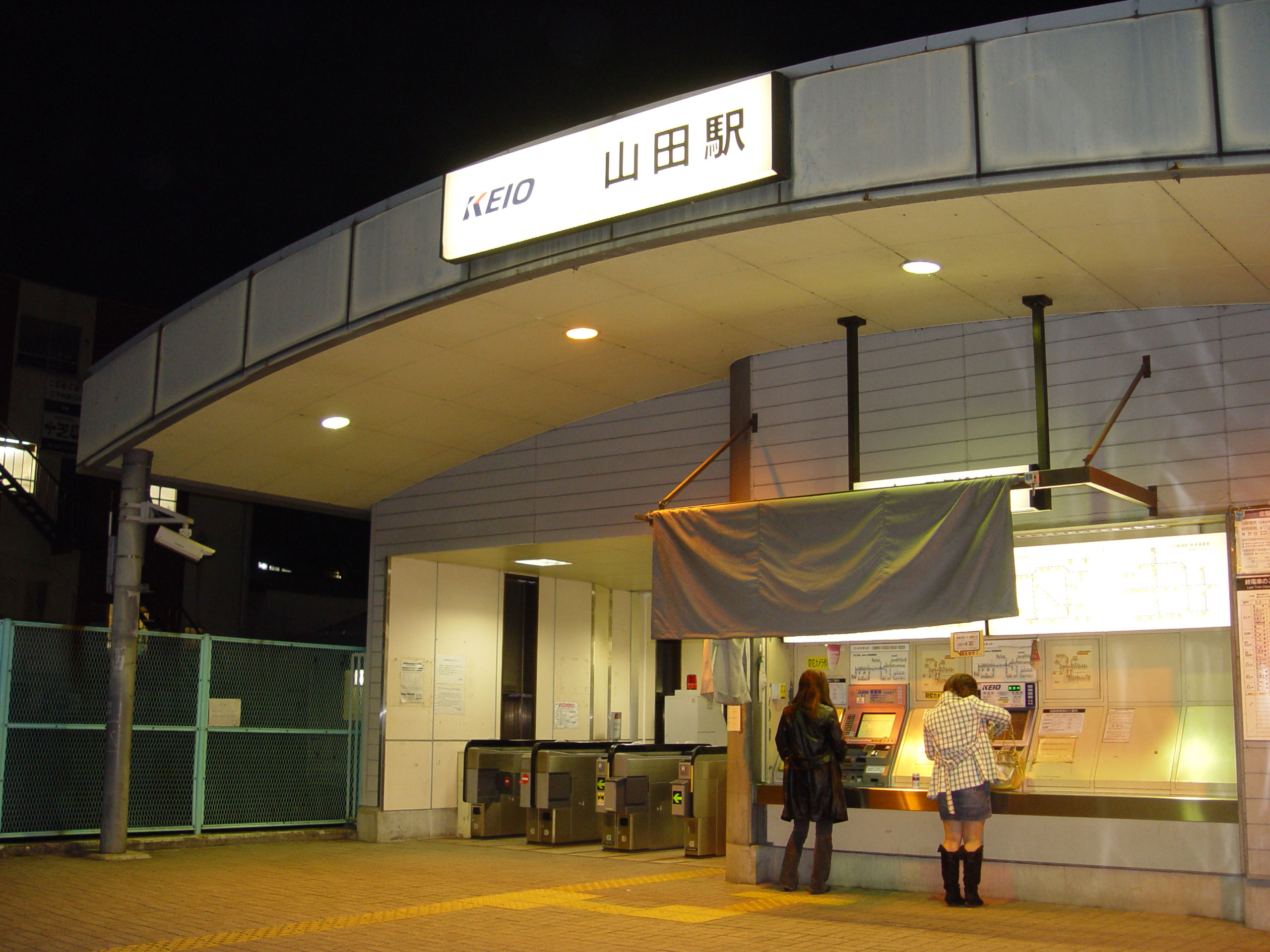 Yamada Station, Keio Takao Line ja: 京王高尾線山田駅